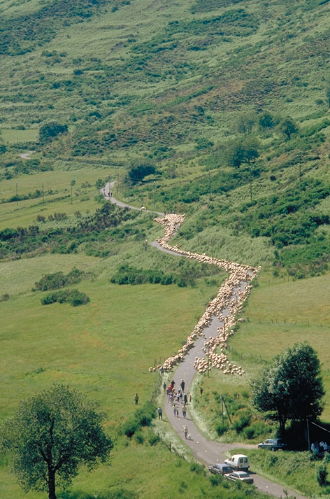 Troupeau transhumant sur le Mont Aigoual (Massif Central, France). Photograph Robin Lacassin.